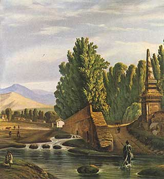 Los tajamares del Mapocho, óleo de Giovatto Molinelli (1855). Museo Histórico Nacional